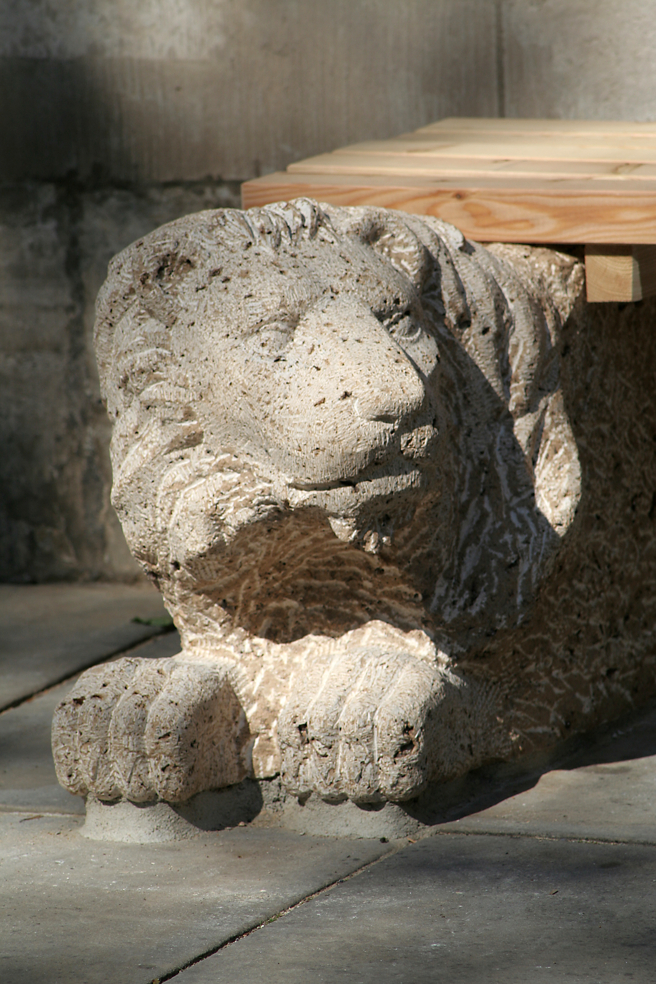 Löwe auf dem Braunschweiger Domplatz